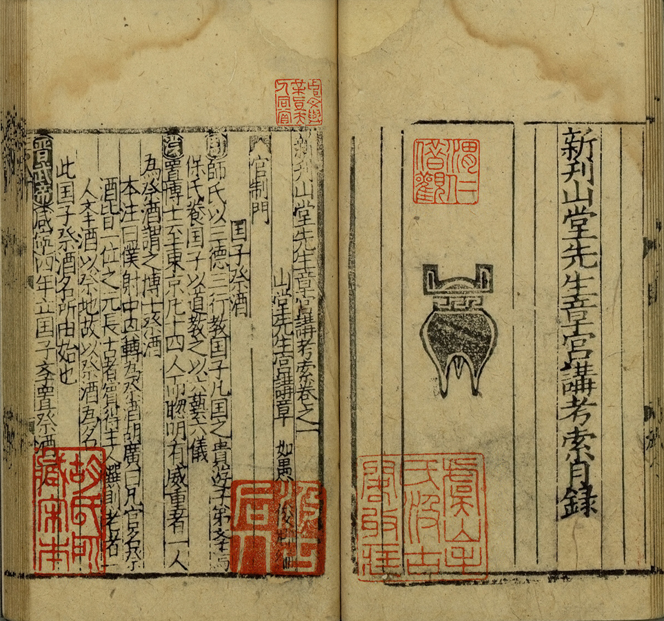 存後卷